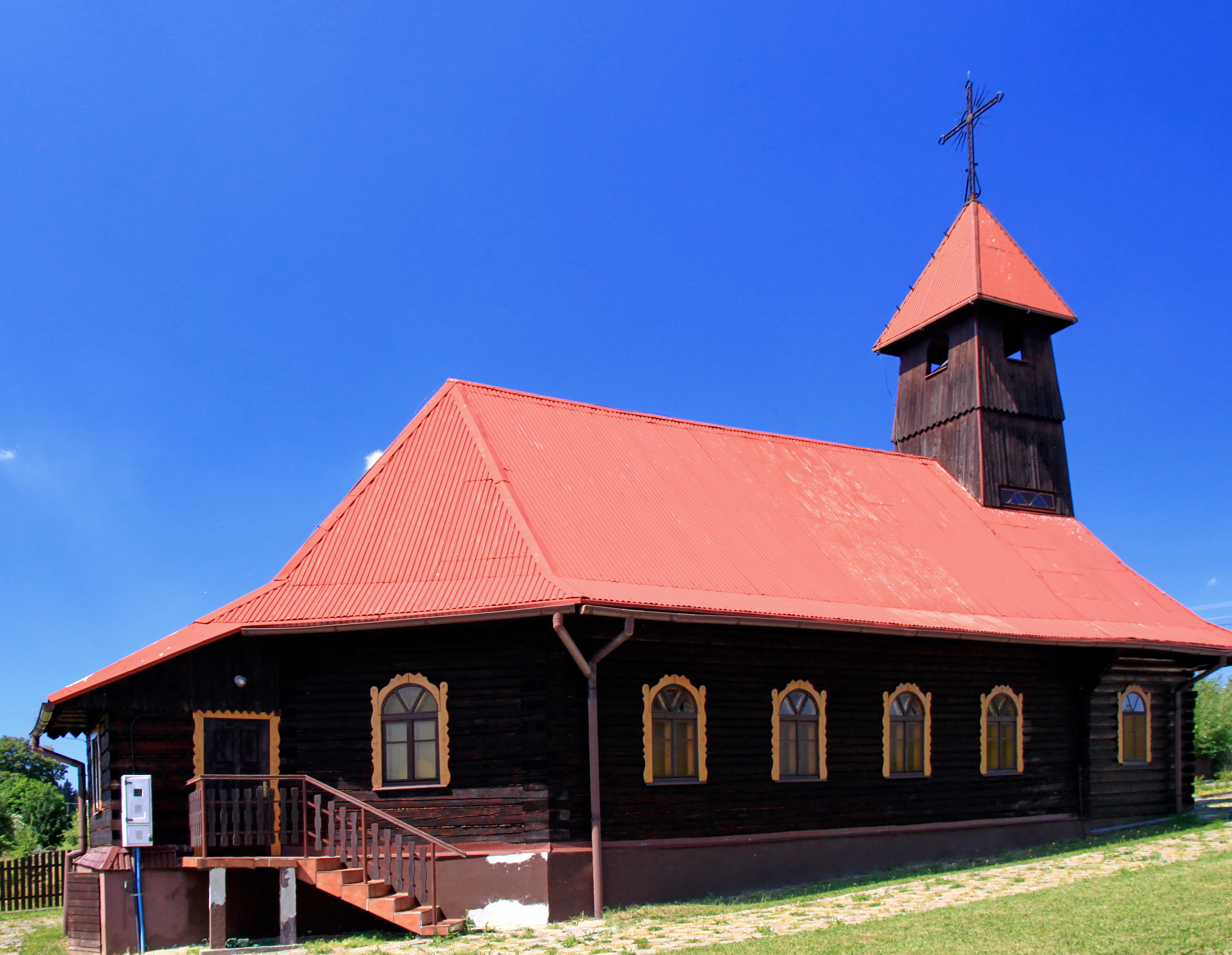 Kościół św. Józefa w Istebnej, znajdujący się wśród zabudowań przysiółka Mlaskawka. Pierwotnie wzniesiony został w latach 1947-1948 w Jaworzynce, w przysiółku Trzycatek, pod wezwaniem Matki Bożej Frydeckiej. Rozebrany i przeniesiony do Mlaskawki, gdzie poświęcono go jako kościół filialny pw. św. Józefa w 1997.